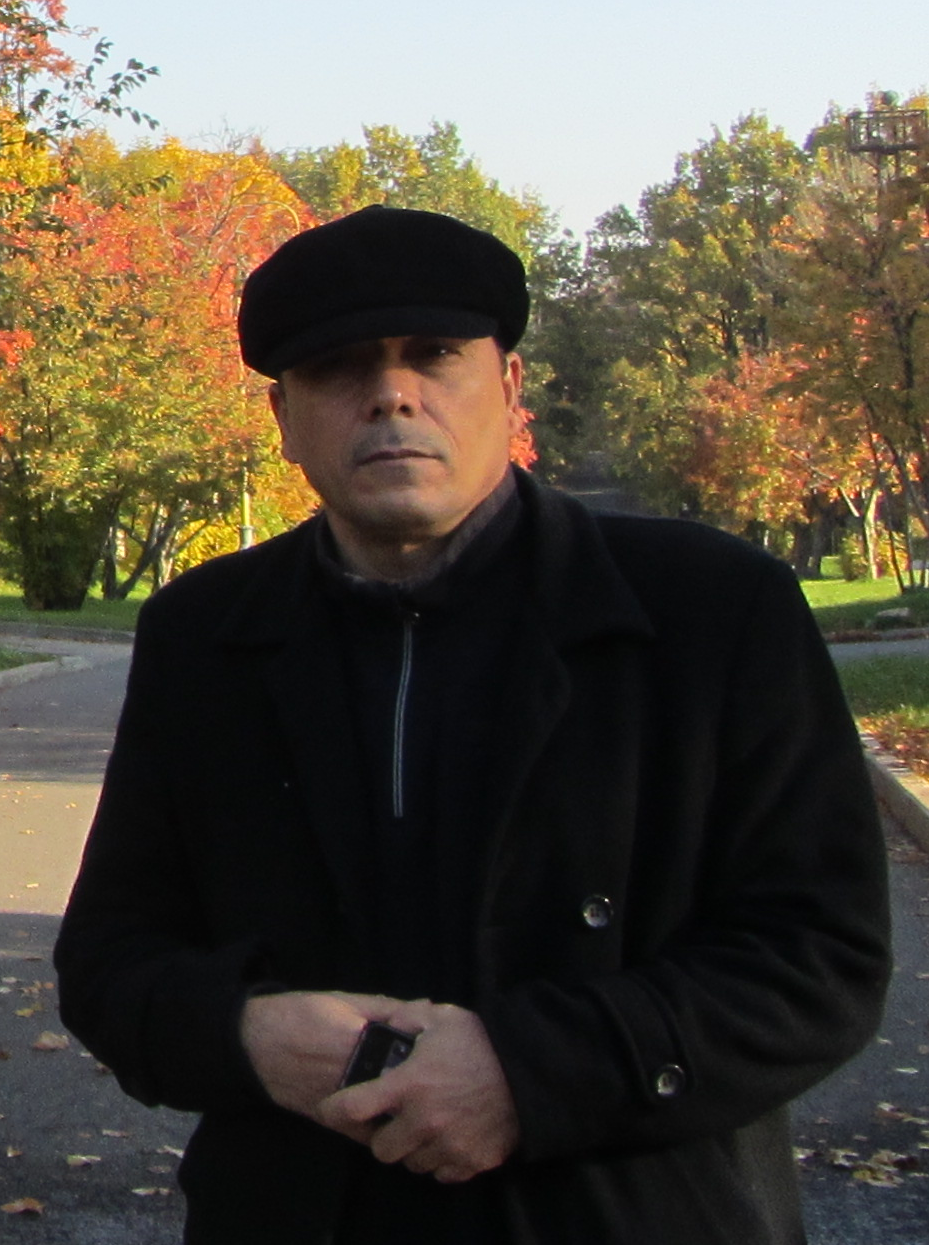 تۆرکجه: محمدرضا بایرامی